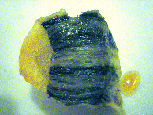 Whale blubber.